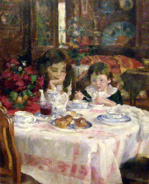 Scène du petit-déjeuner de deux enfants dans une demeure bourgeoise, peinte par Arthur Navez (1881-1931) au début du XXe siècle